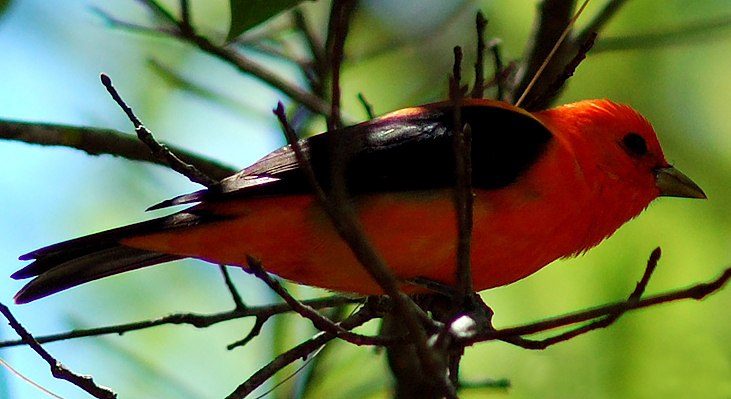 Piranga olivacea